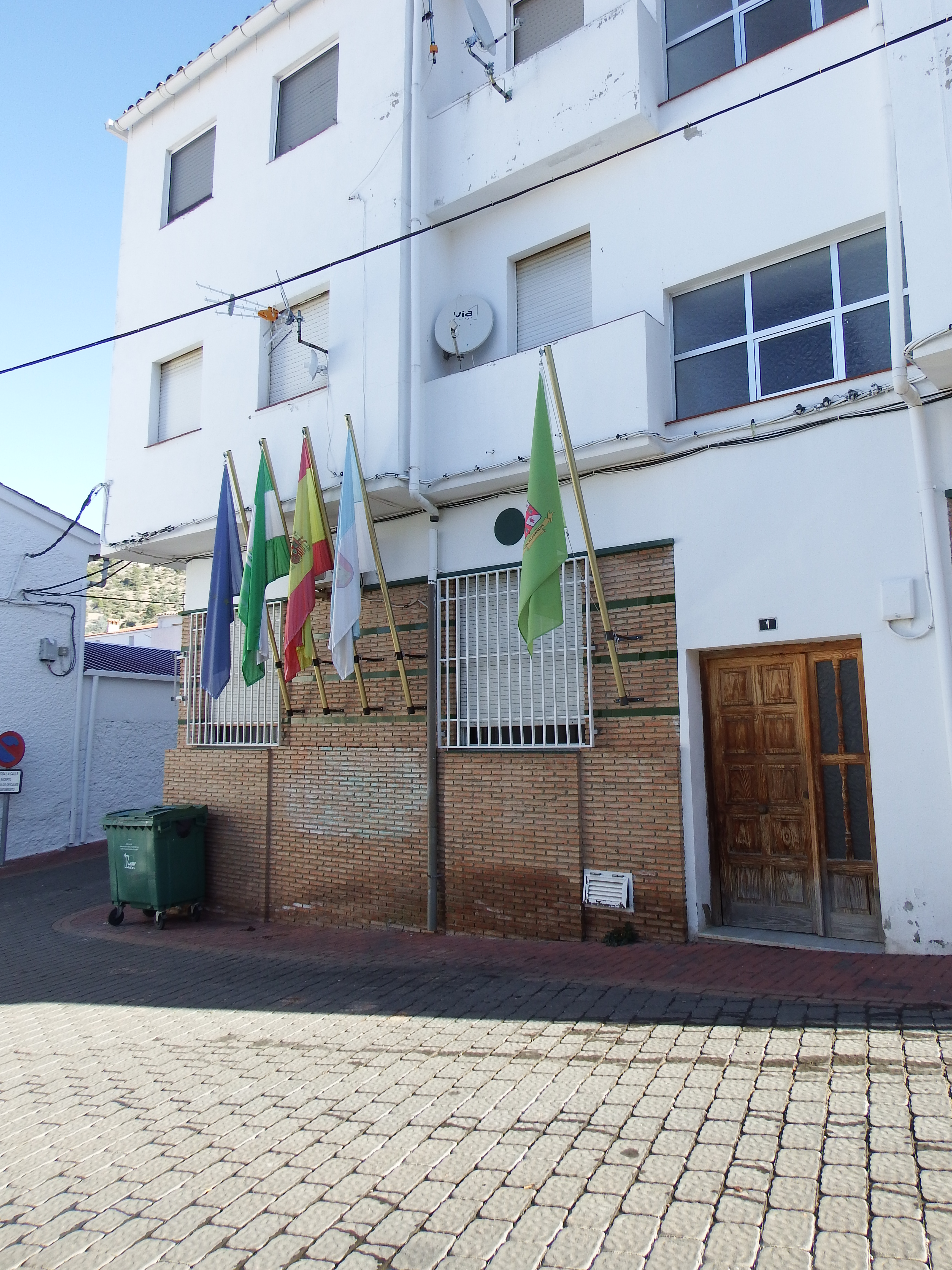 Benatae